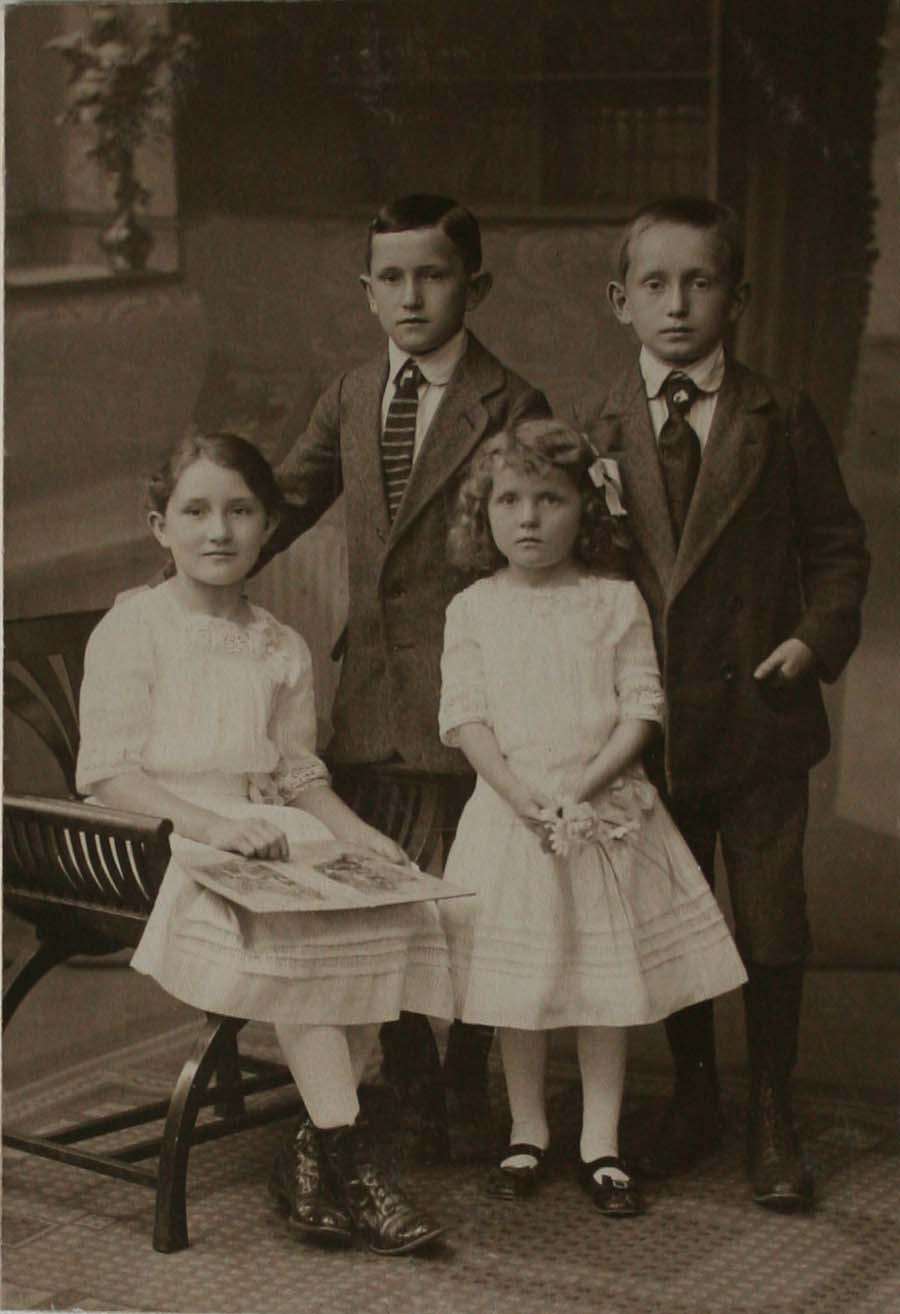 Otto Müller (hinten links) mit seinen Geschwistern Alfred, Anna und Lieschen, Halle ca. 1913